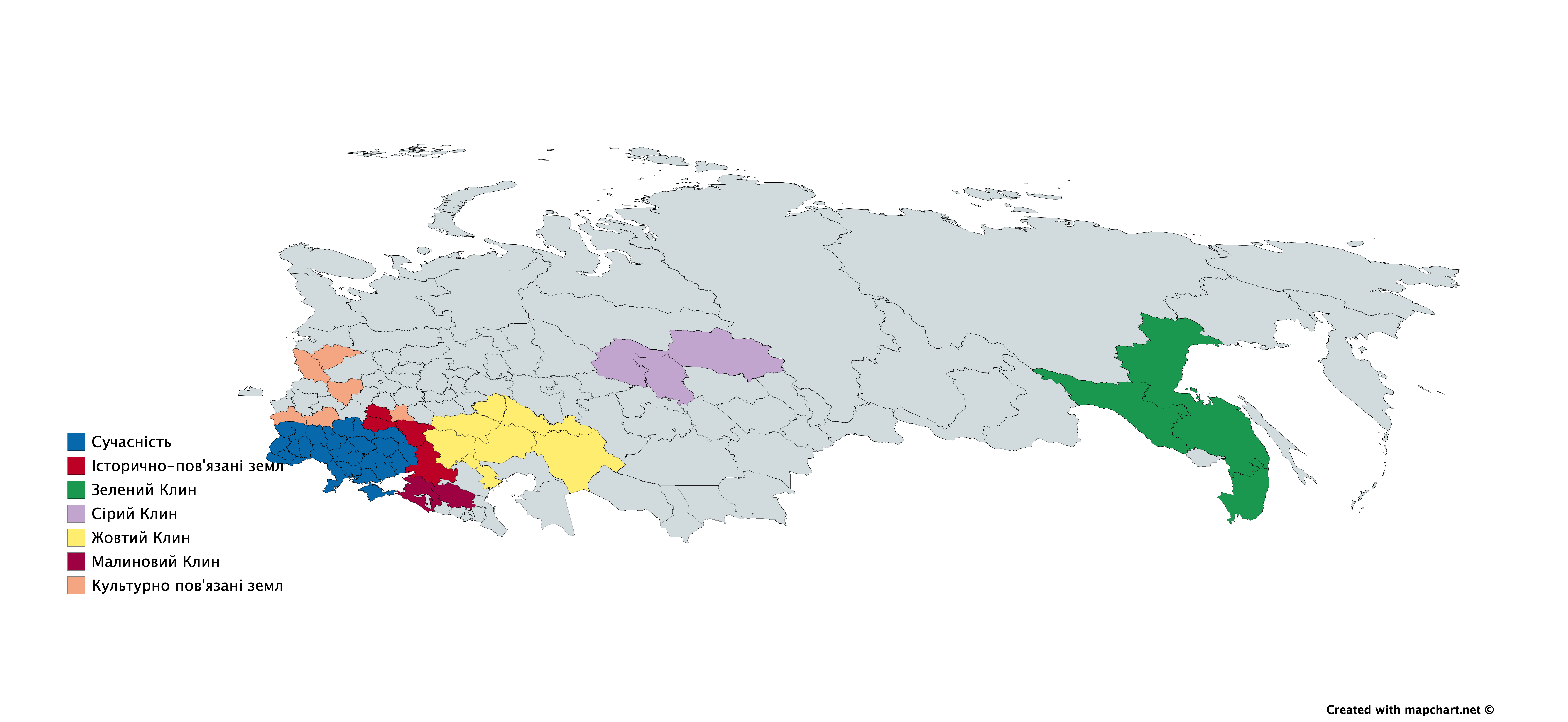 Поширення української культури на казахстанських, російських та білоруських землях починаючи з епохи Київської Русі та закінчуючи сьогоденням